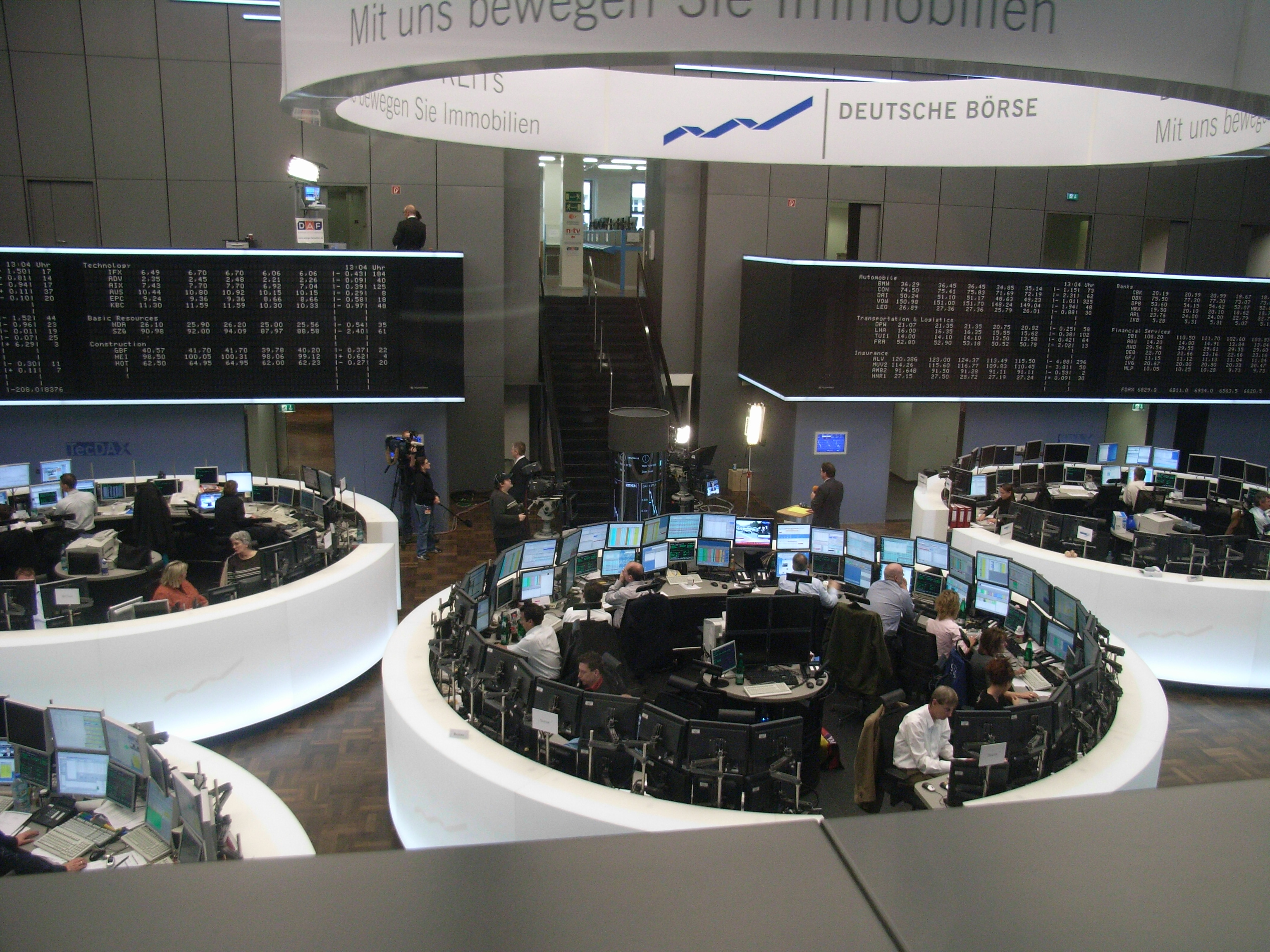 Innenansicht der Frankfurter Börse nach Renovierung